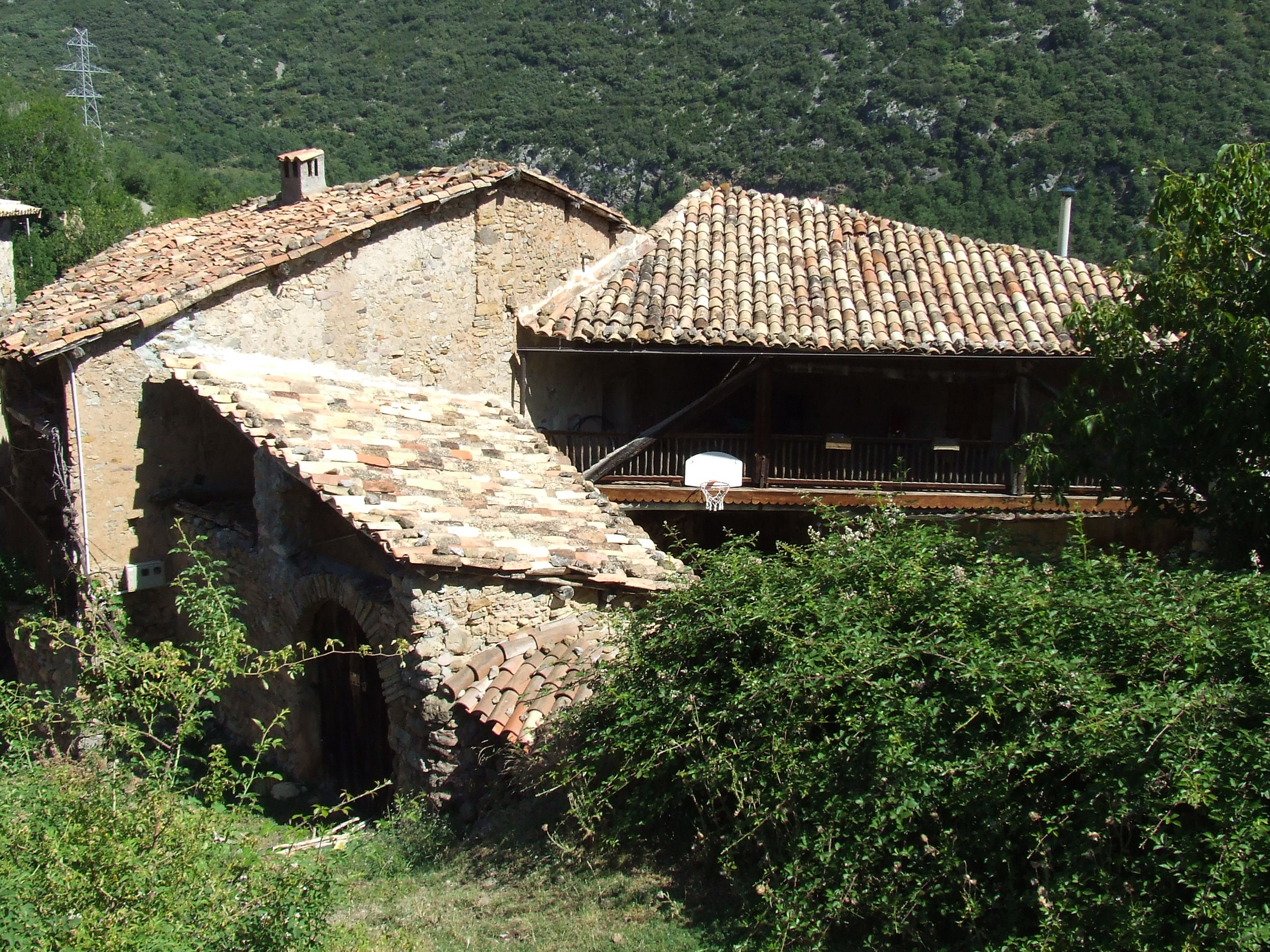 Ca de Cília, a Pinyana (Viu de Llevata, el Pont de Suert, Alta Ribagorça)